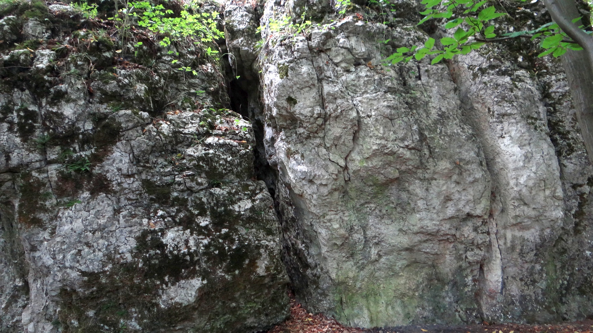 Jaskinia między Studniami na wzniesieniu Dudnik w Podlesicach